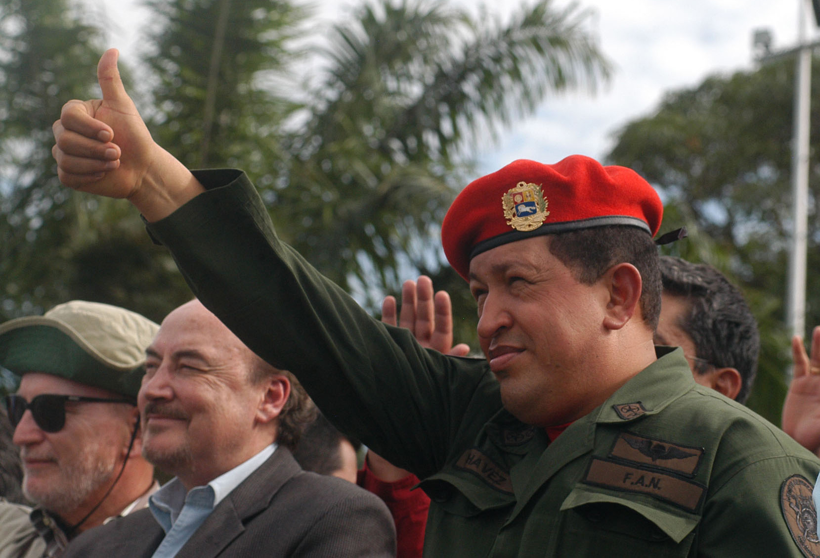 Hugo Chávez junto a los garantes de la "Operación Emmmanuel